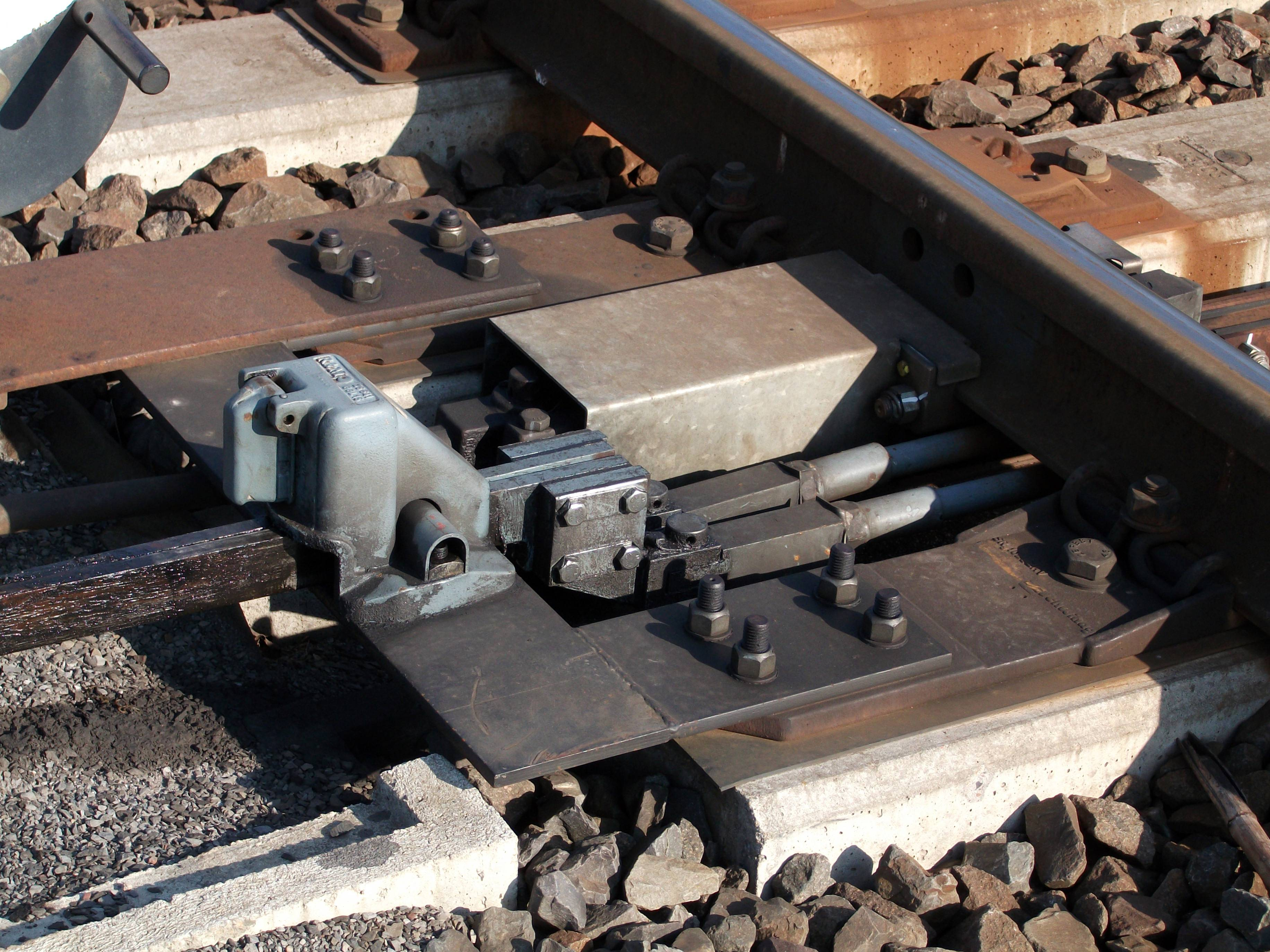 ...mit verstellbaren Stangen, DR-Folgeabhängigkeit. Awanschl Brünner Straße, Ersatzneubau für die geschlossene Strecke 6433.